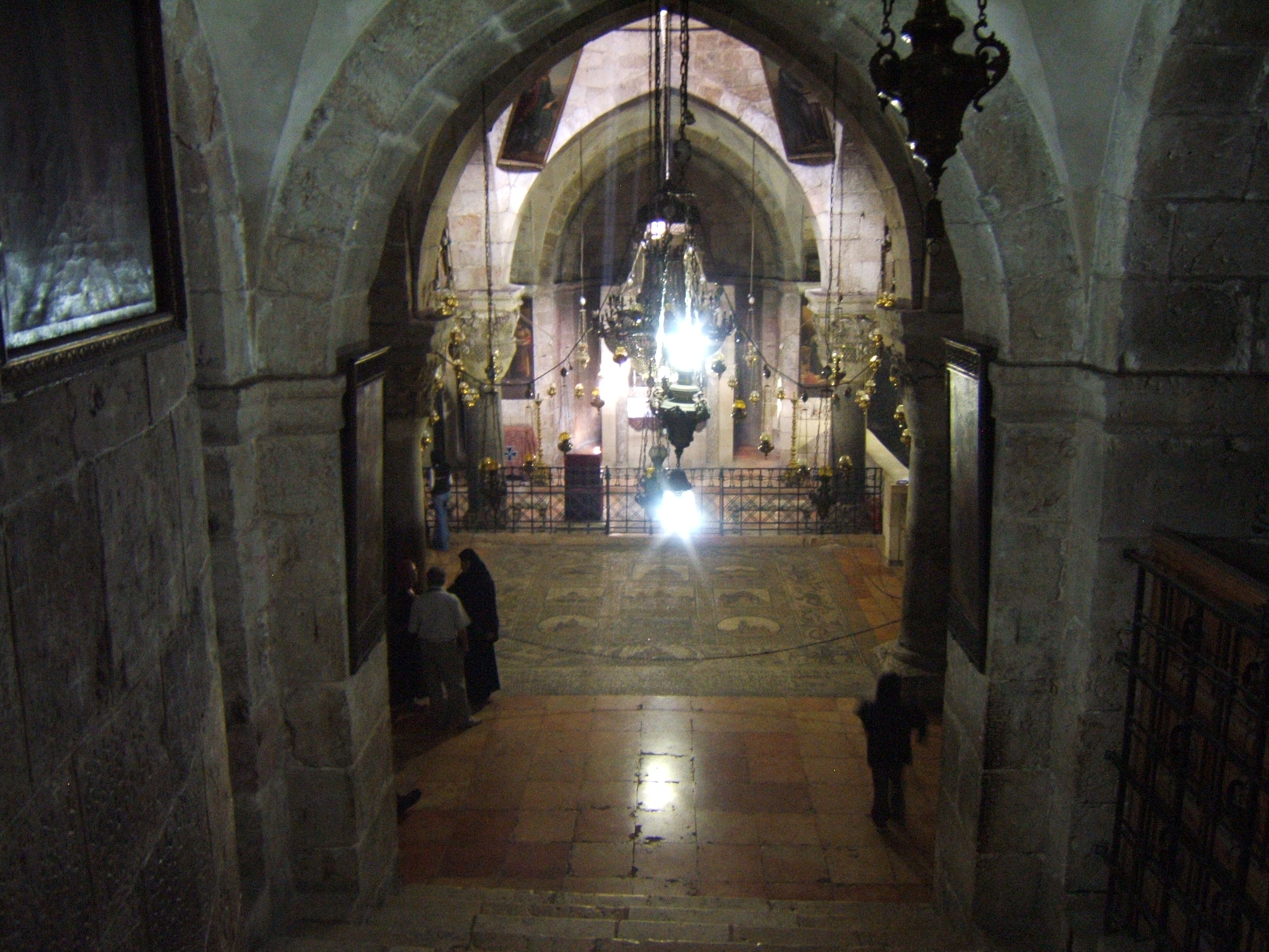 La capilla de Santa Elena, en el interior de la iglesia del Santo Sepulcro. Jerusalén, Israel.